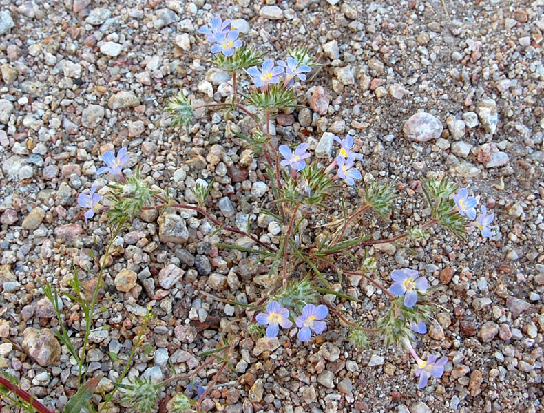 Eriastrum eremicum from e. Maricopa County, Arizona, USA.